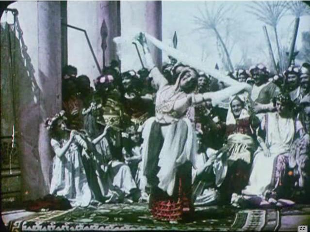 Dance of the seven veils